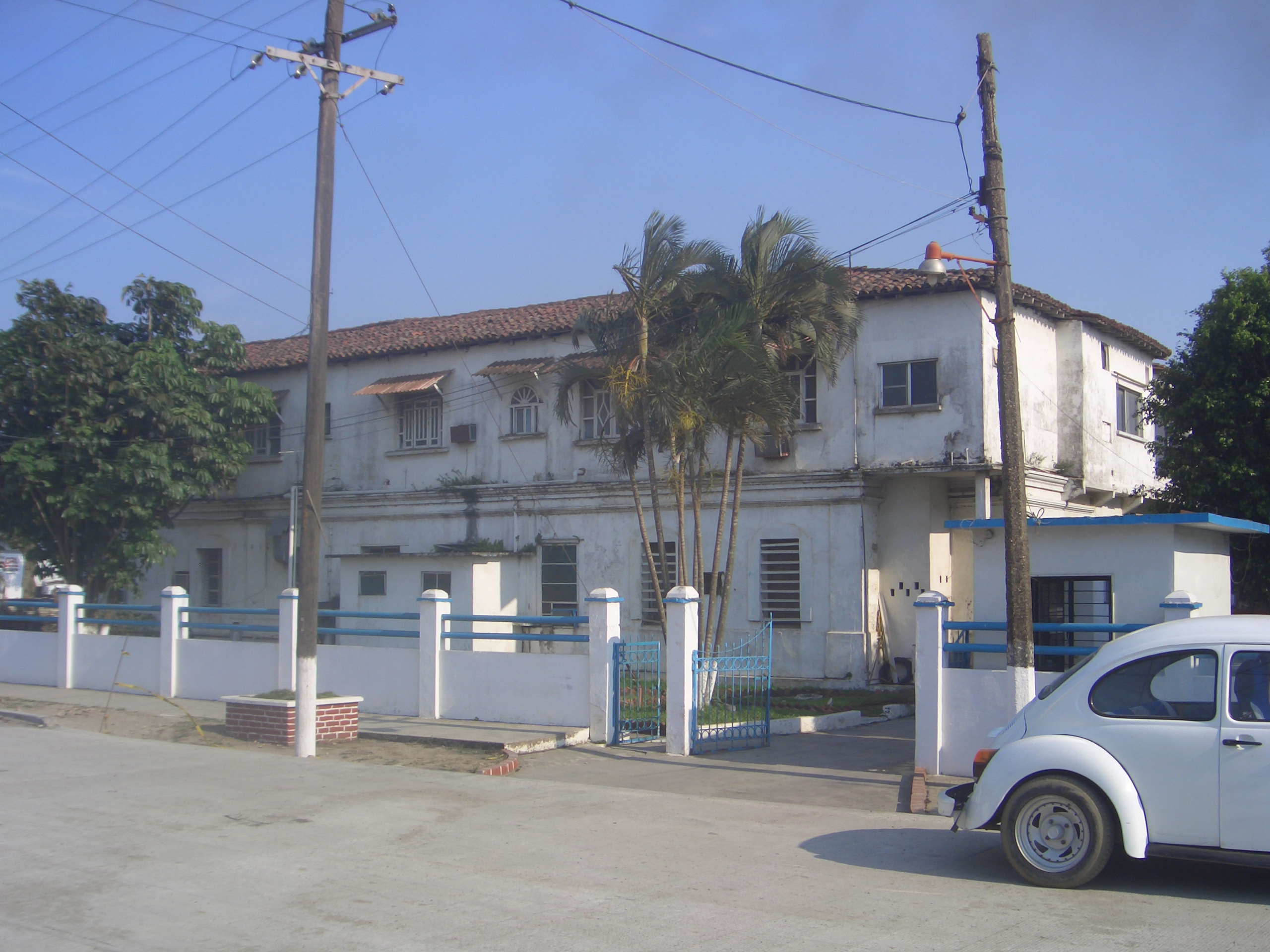 Edificio Casa Grande. Antigua residencia de los dueños del ingenio San Cristobal en Carlos A. Carrillo, Ver.